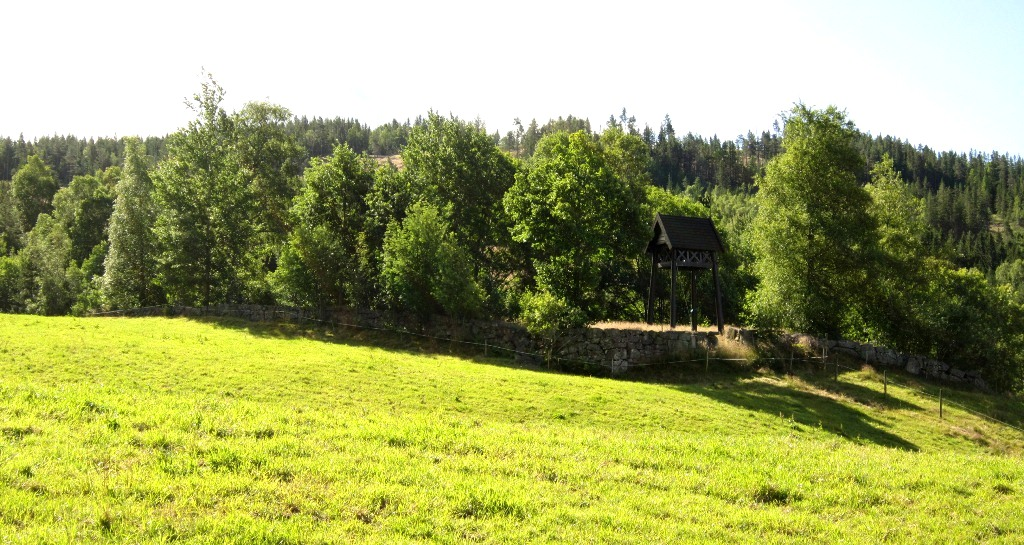 Tveit gamle kirkegård, Tveitsund (Treungen) i Nissedal